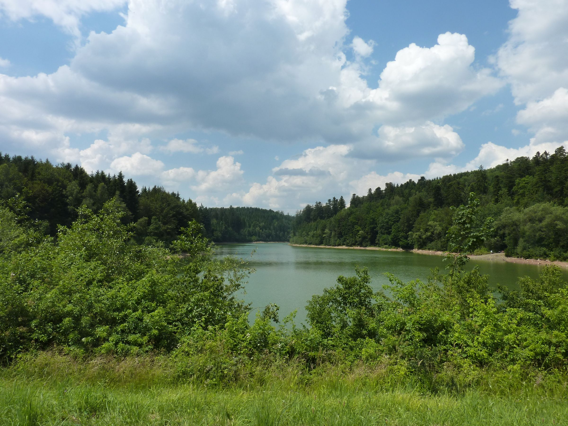 Herrenbachstausee